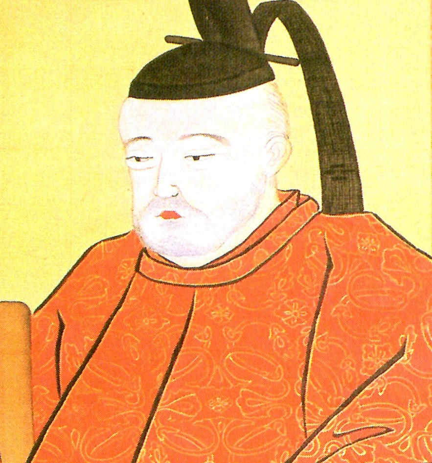 遠山友央の肖像。